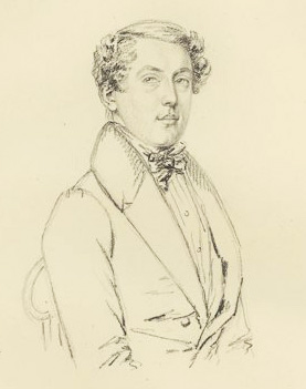 Elias Lagerheim (1791-1864)